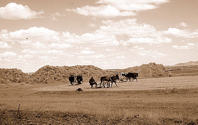 Trilla de trigo, Saucedilla, años 60